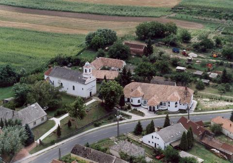 Görgeteg, Hungary, aerialphotography